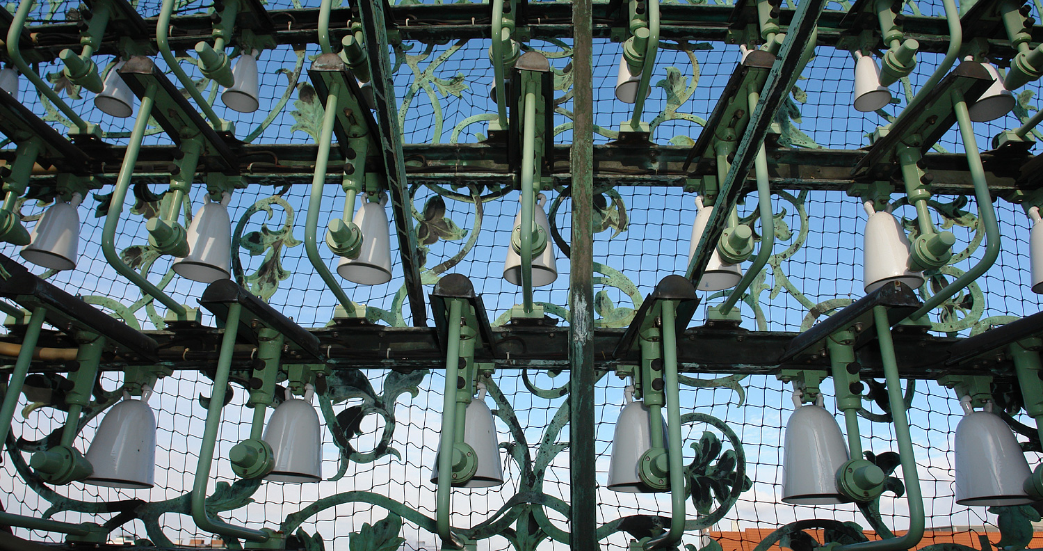 Böttcherstraße Bremen, Haus des Glockenspiels: Meißner-Porzellanglocken (drittes Glockenspiel), Reihe 3–5